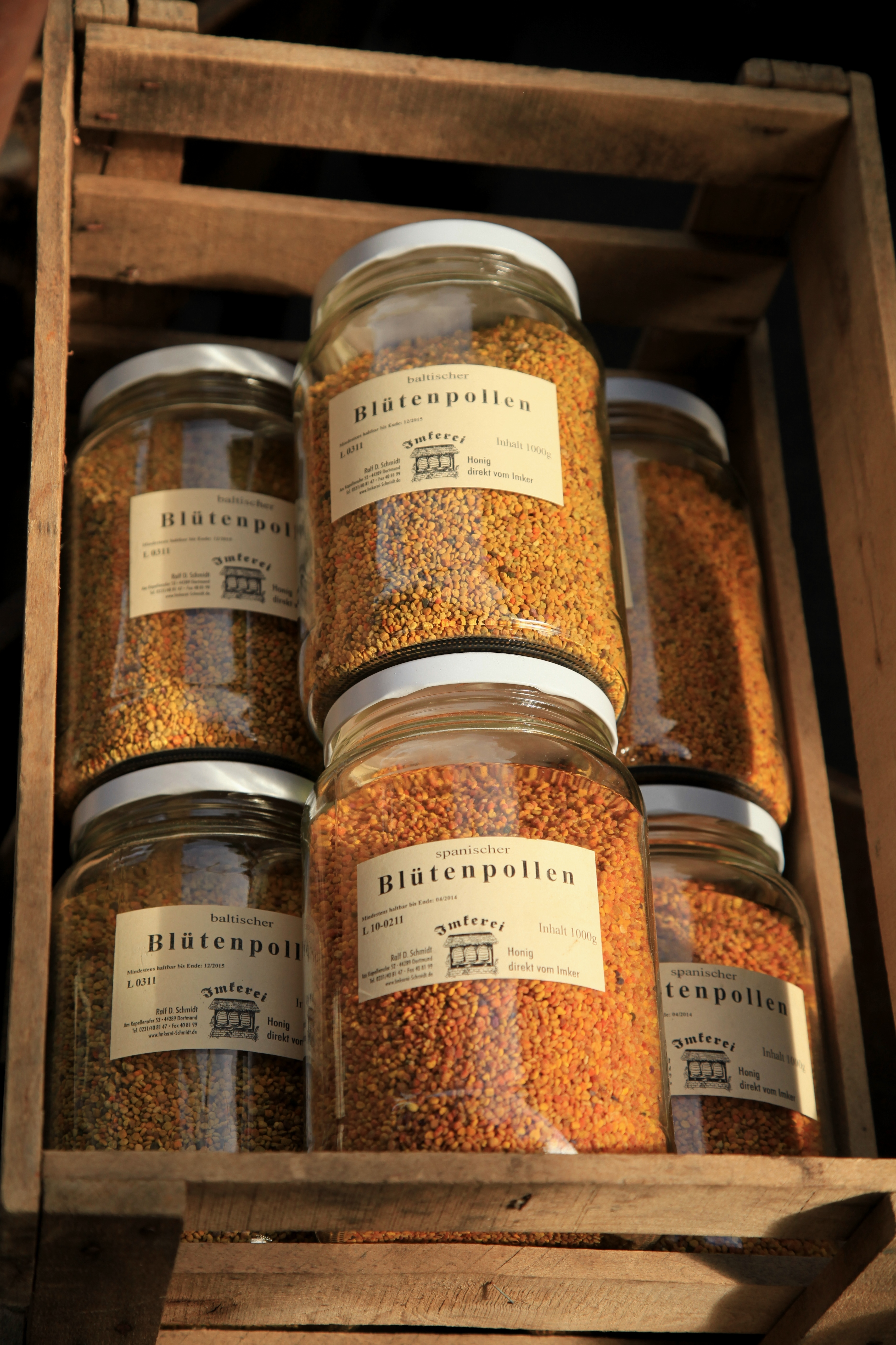 Bauernmarkt in Remscheid-Lüttringhausen